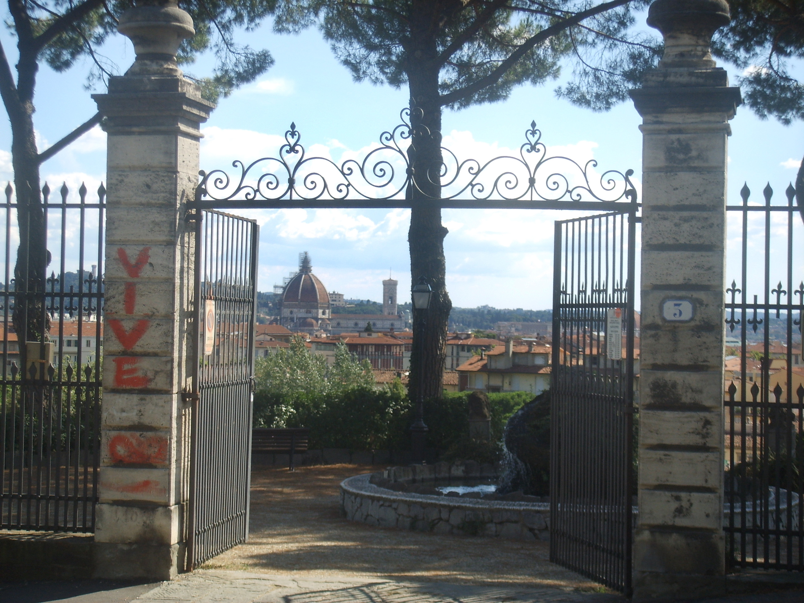 Orticultura Garden, Giardino dell'Orticultura in Florence, Italy